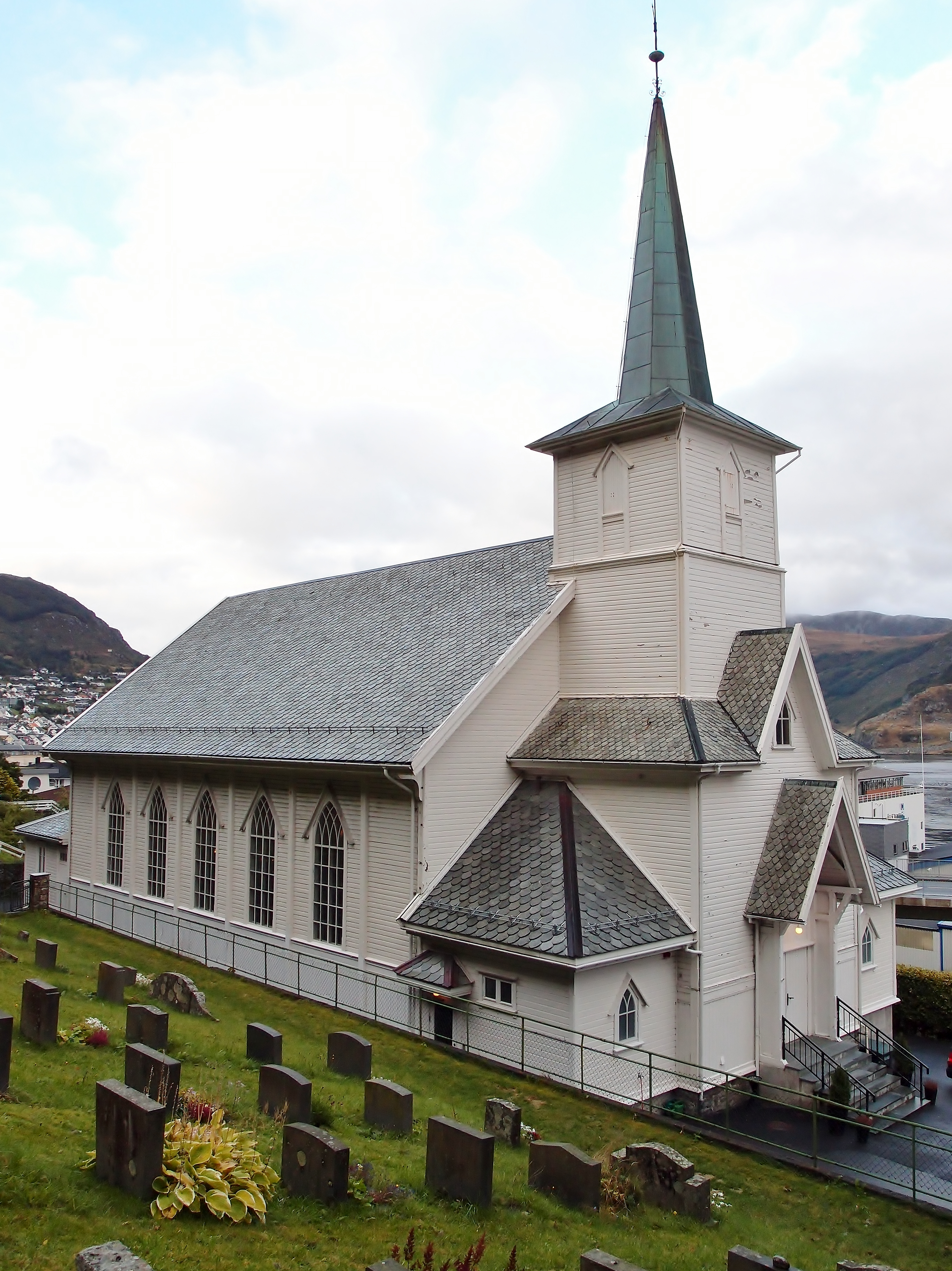 Sør Vågsøy kirke, Måløy i Vågsøy kommune, Sogn og Fjordane. Kyrkja stod ferdig i 1907.